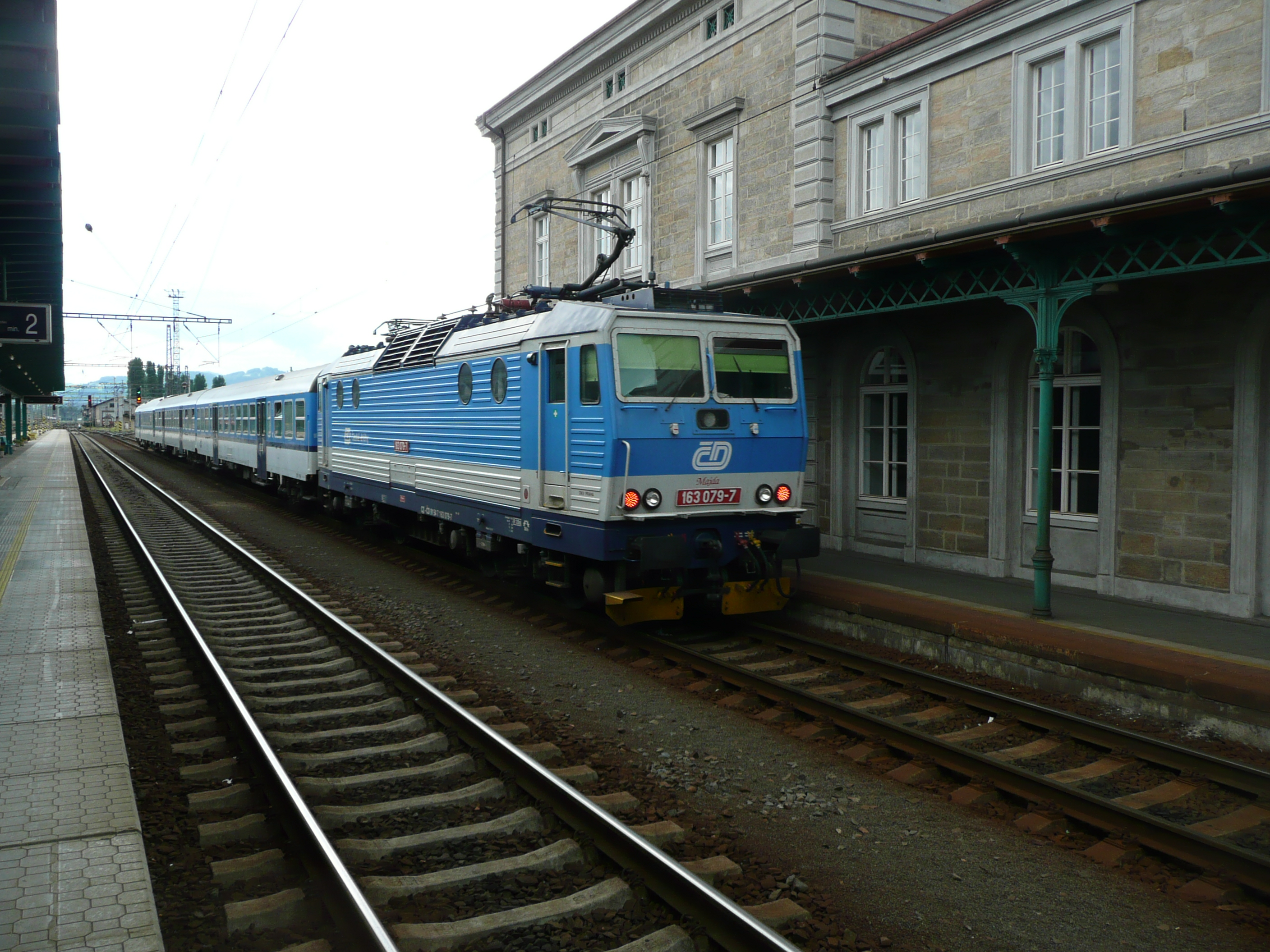 163 079 im Wendezugdienst auf der Linie Děčín–Most im Jahr 2012